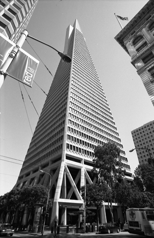 TransAmerica Pyramide à San Francisco - Avril 2005